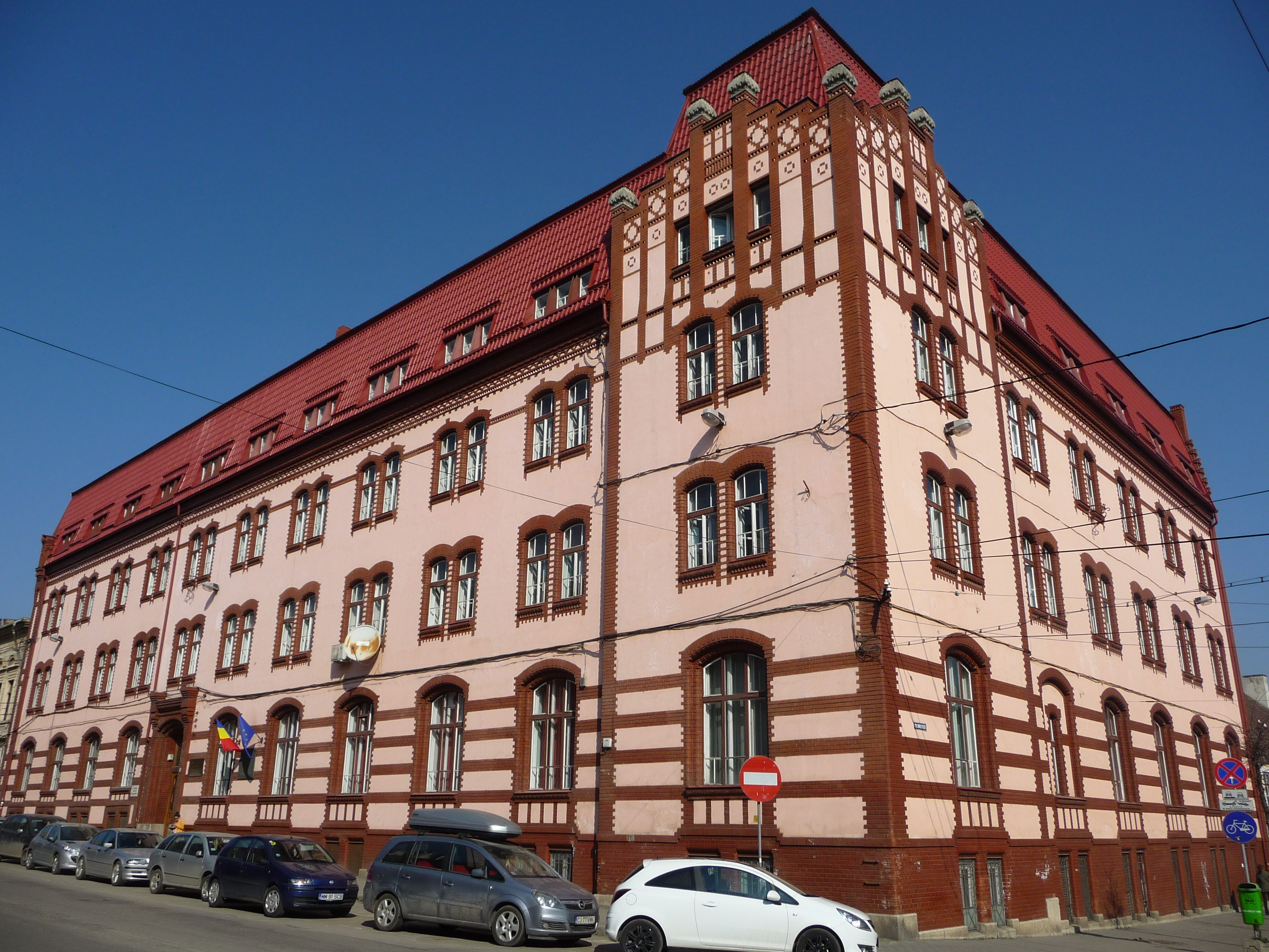 A Babeş–Bolyai Tudományegyetem jogtudományi kara Kolozsváron